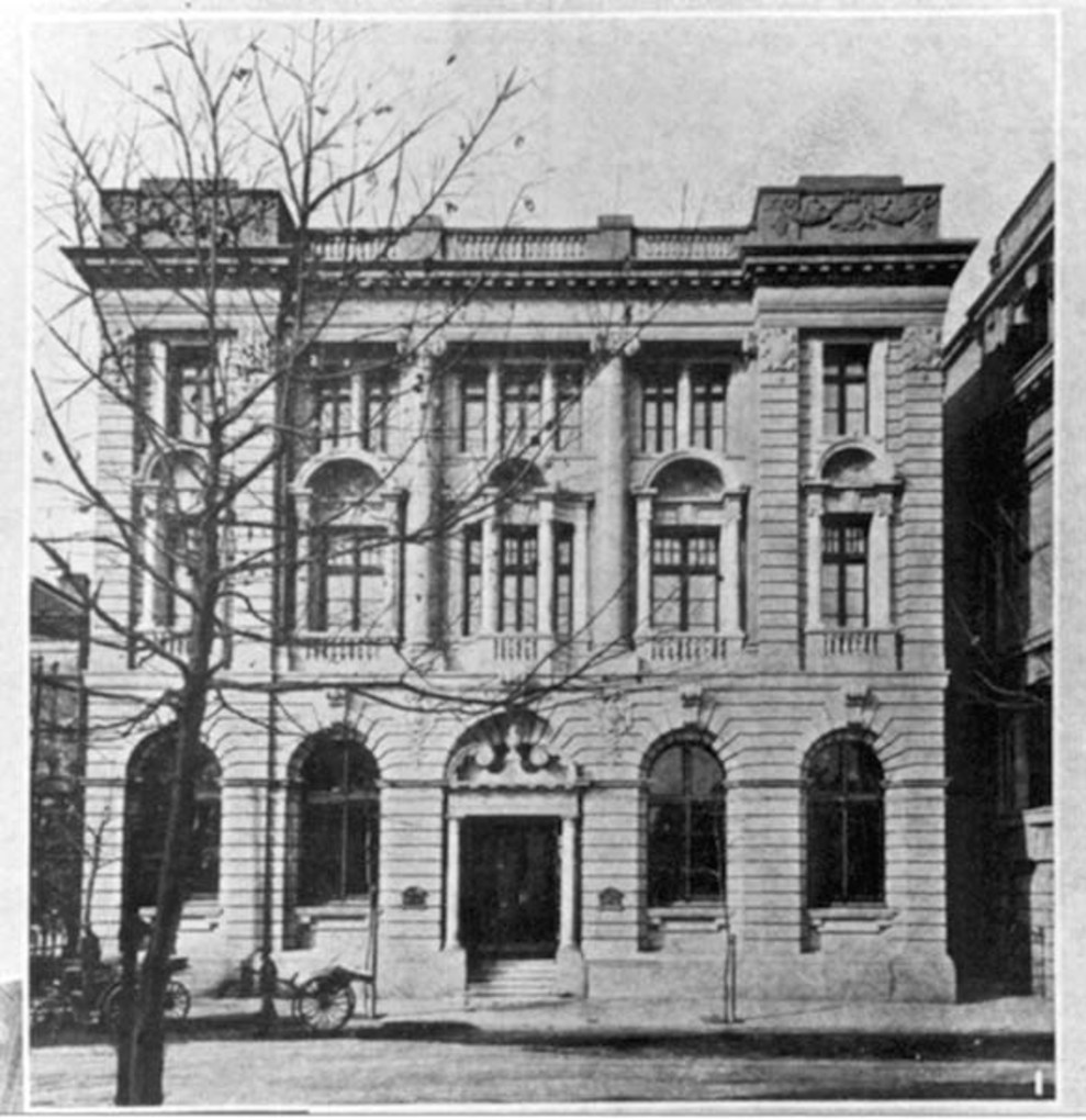 上海外滩东方汇理银行大楼旧景